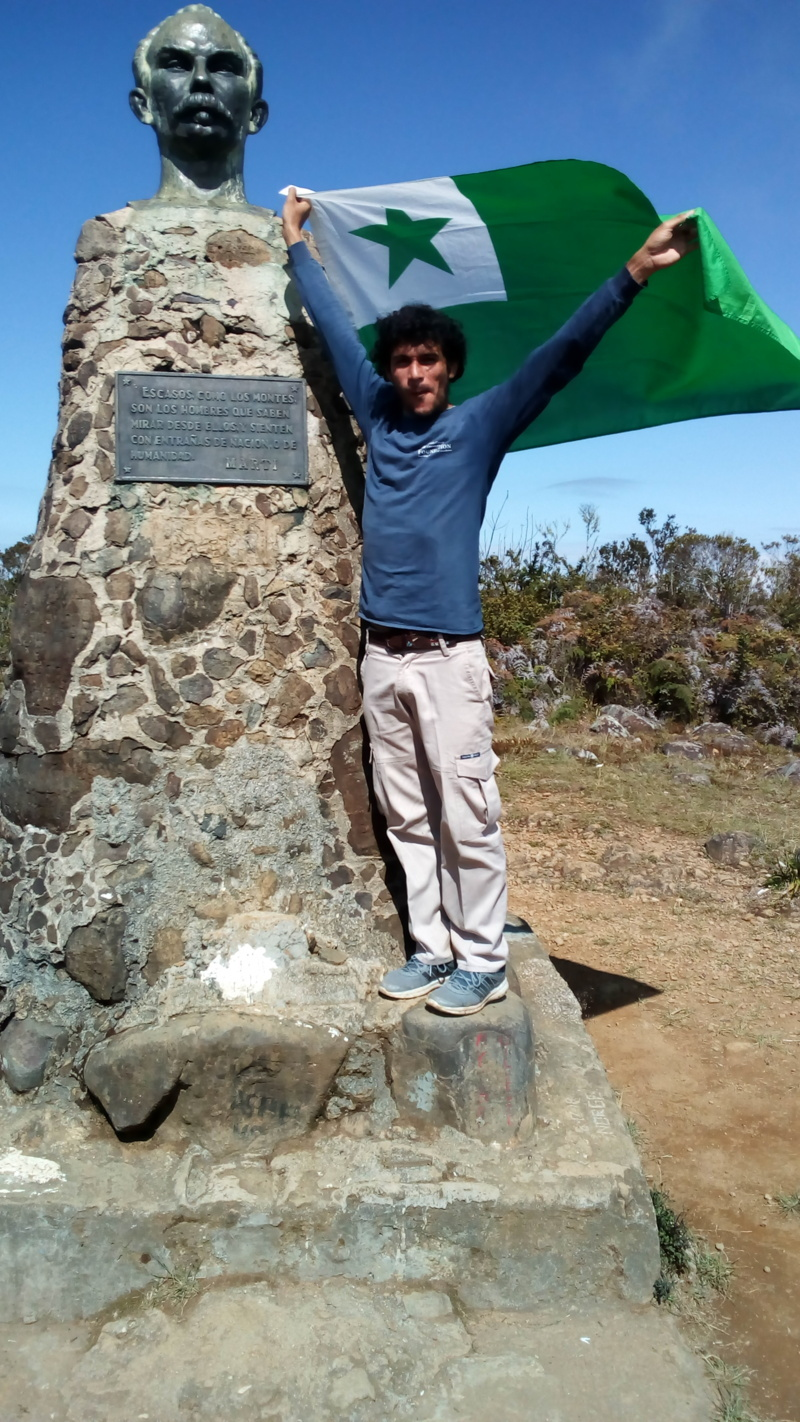 Foto ĉe la plej alta pinto de Kubo, Pico Turquino (1974m) kun la flago de Esperanto ĉe la busto de José Martí la nacia heroo de Kubo.